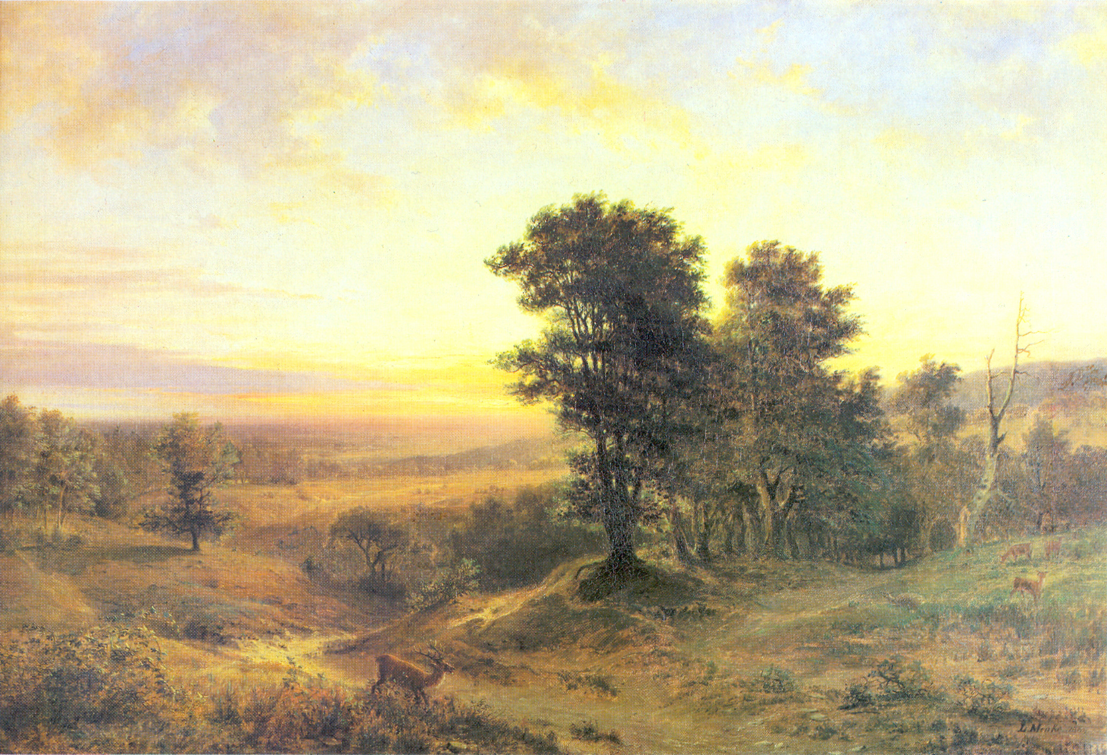 Zitiert aus der Bildbeschreibung des unten genannten Buchs: Ölgemälde von Ludwig Menke aus dem Jahre 1864 (Detmold, Dr. Armin Prinz zur Lippe)